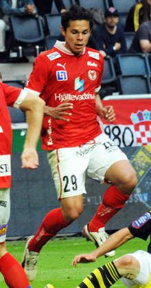 Romário Pereira Sipião